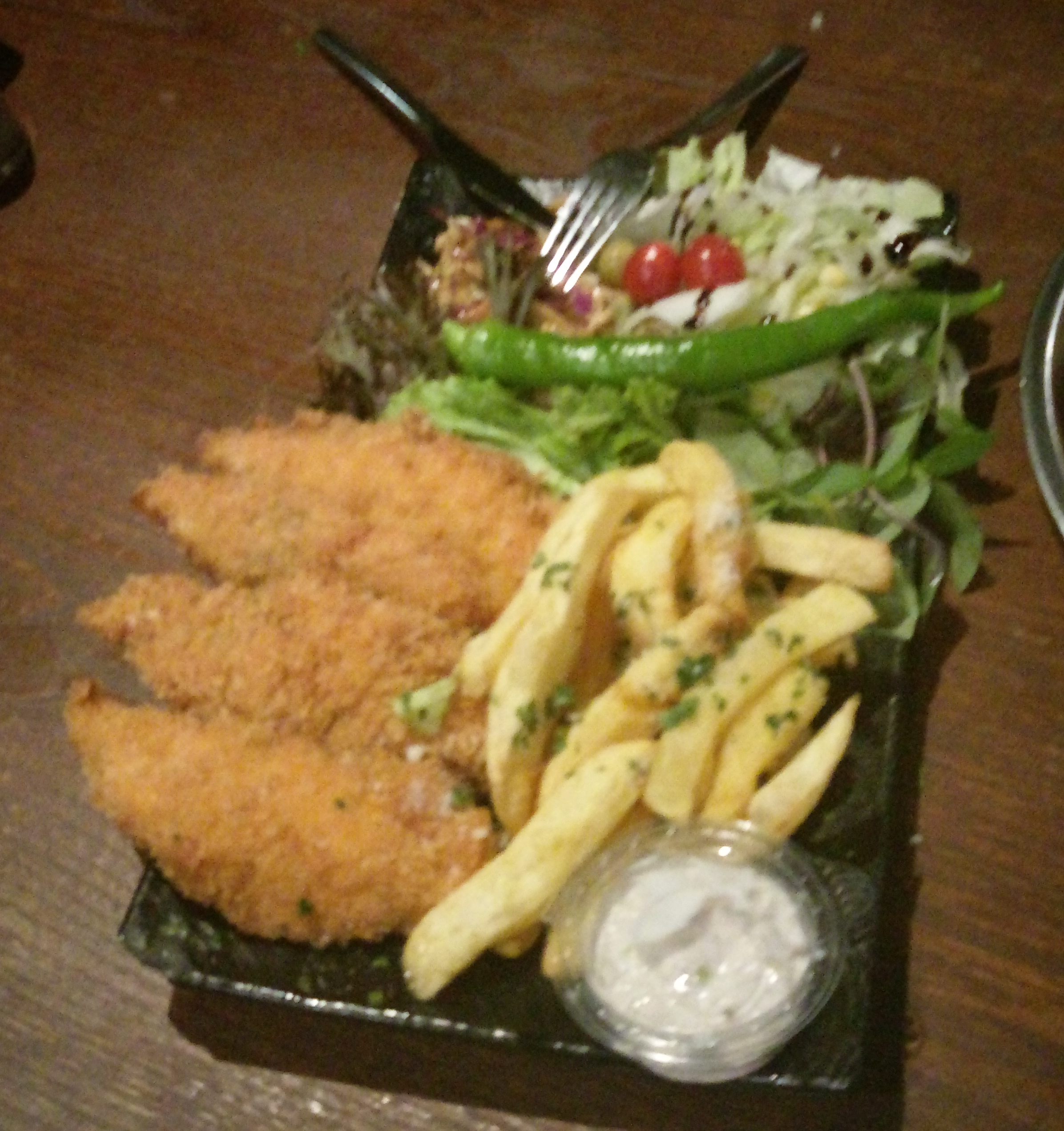 شنیتسل مرغ